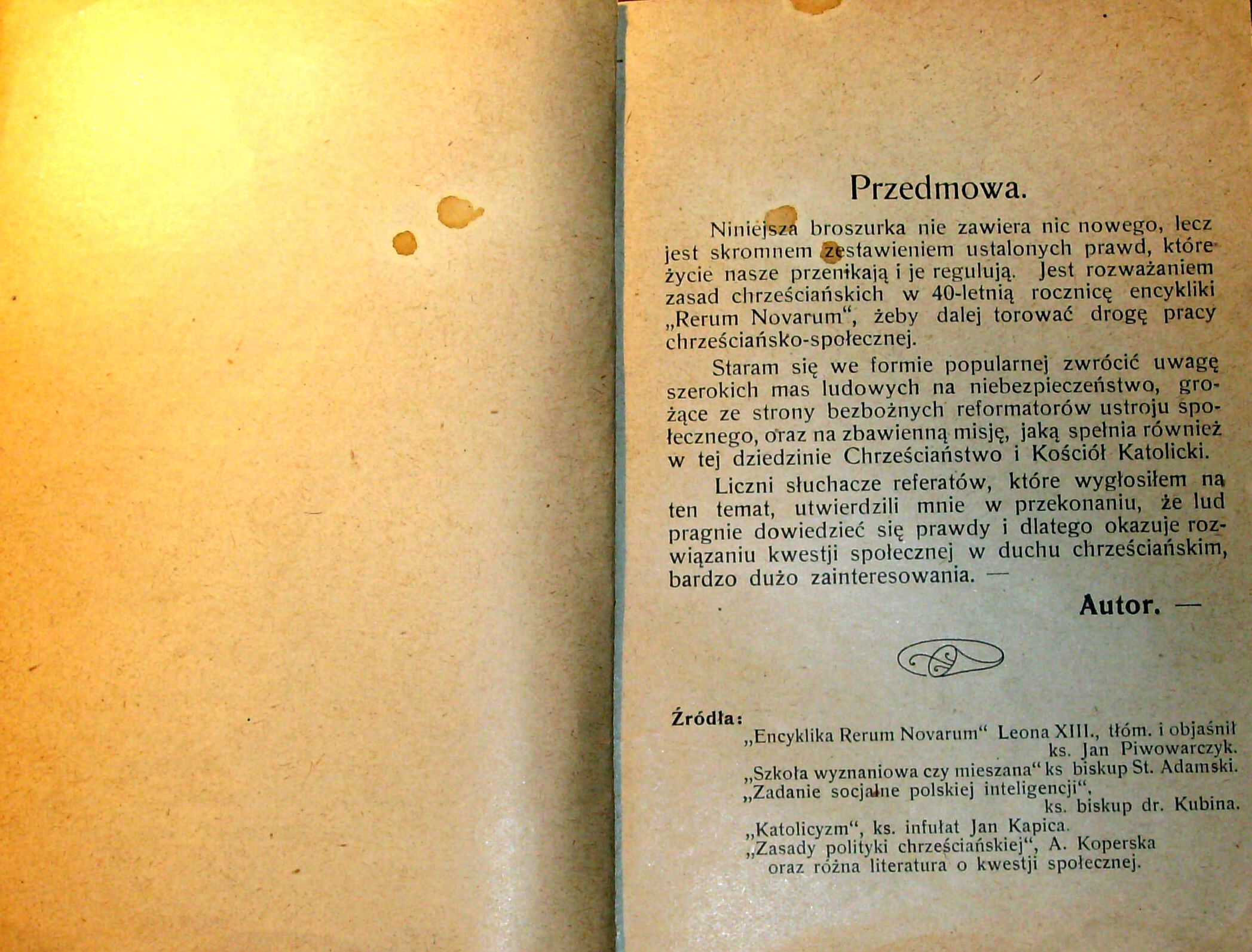 Stanisław Krzyżowski, Rozmyślania w czterdziestą rocznicę encykliki „Rerum novarum”, wydanej 15 maja 1891 r. przez papieża Leona XIII, Pszczyna 1931